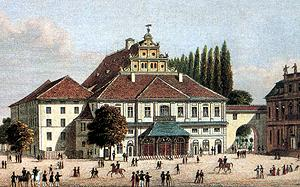 Neues Lusthaus in Stuttgart als Hoftheater, 1845